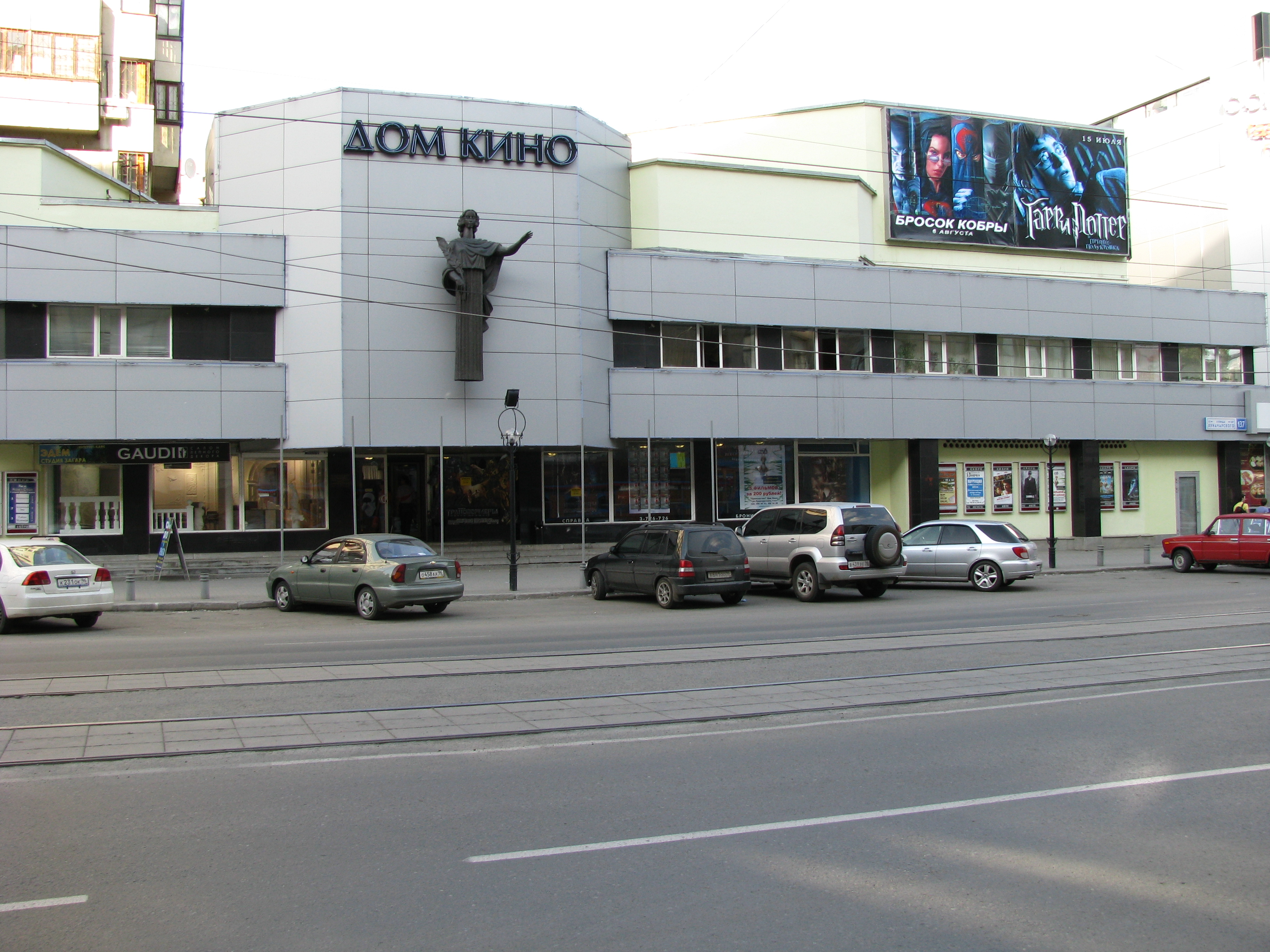 Премьер-зал "Дома Кино" в Екатеринбурге